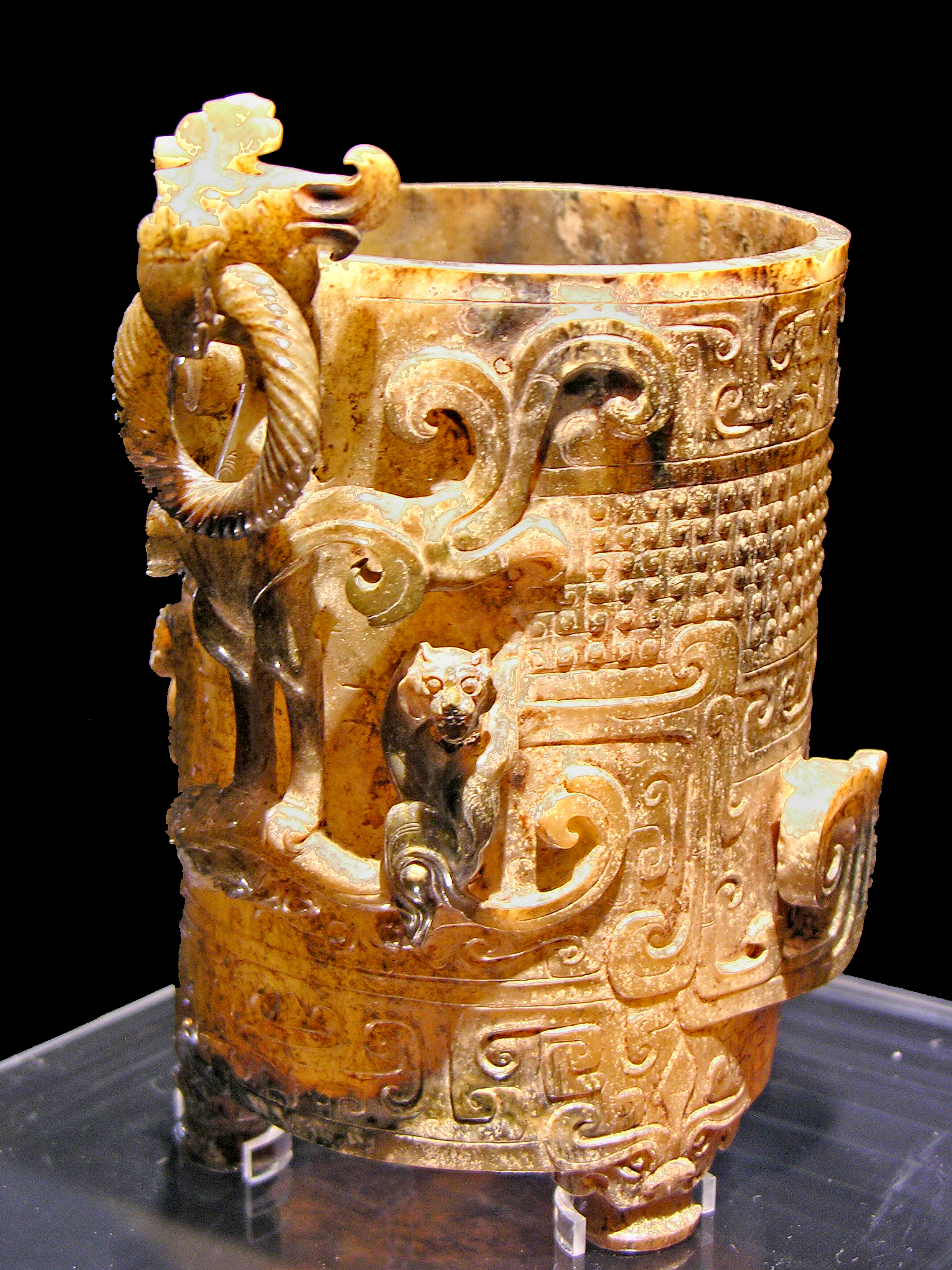 Gobelet à vin utilisé sous la dynastie des Han de l'Ouest entre l'an - 206 et l'an 8